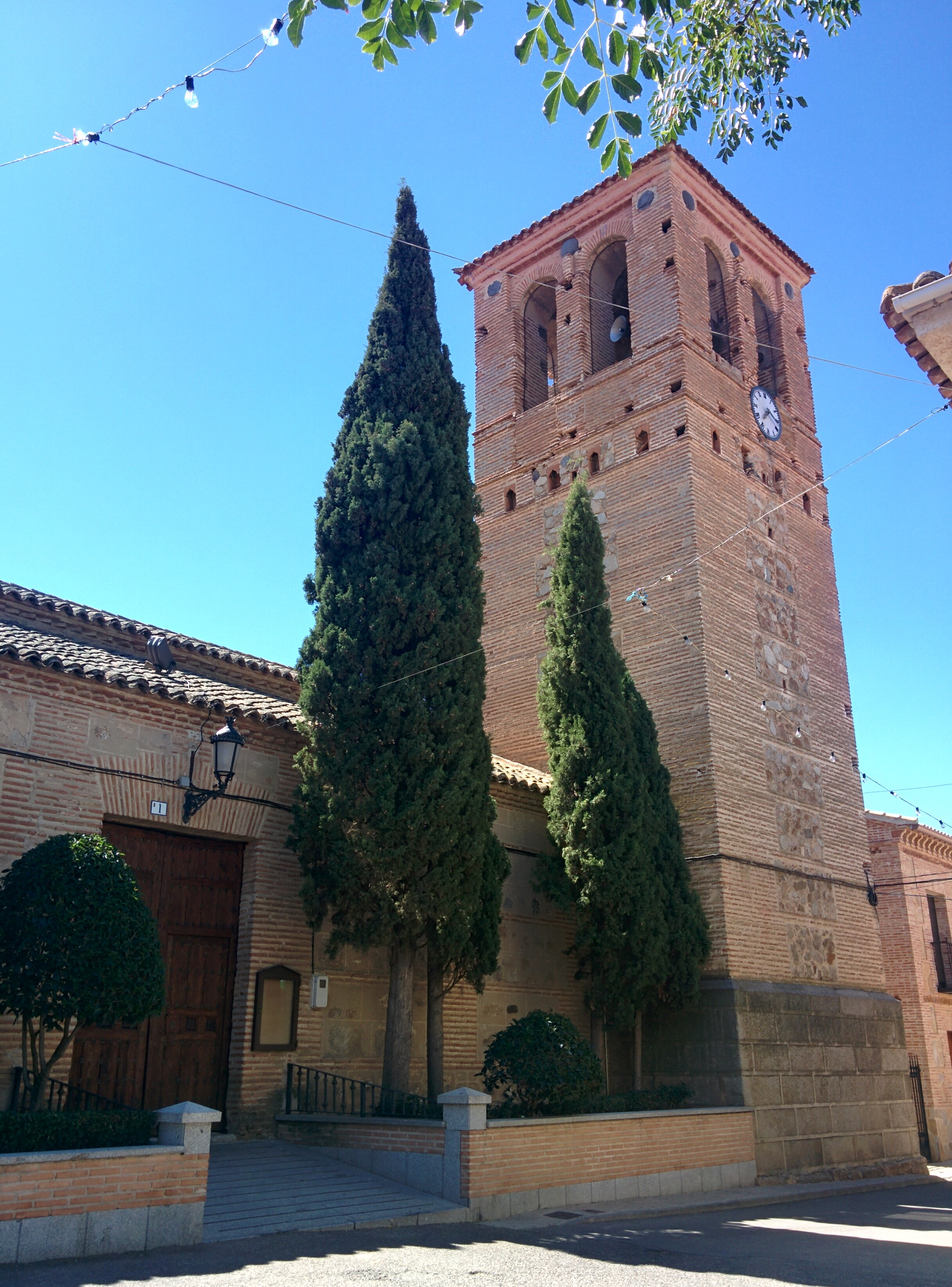 Iglesia de la Inmaculada Concepción, en Totanés (Toledo, España).